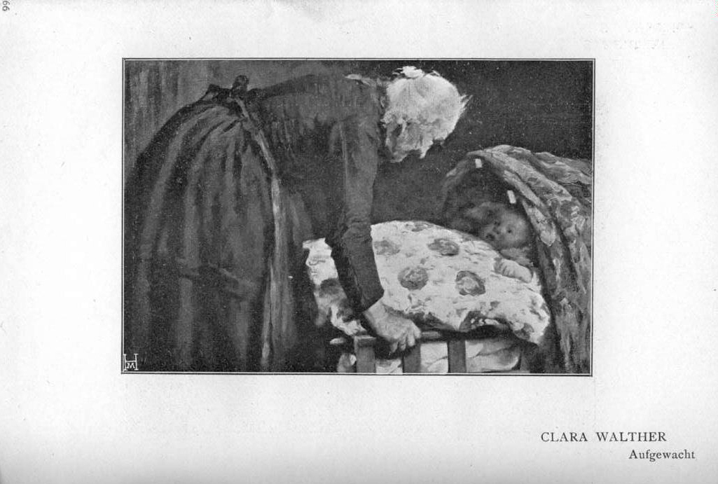 Aufgewacht